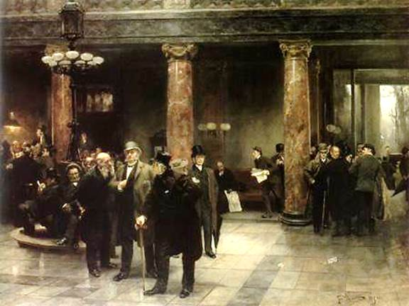 An der Börse